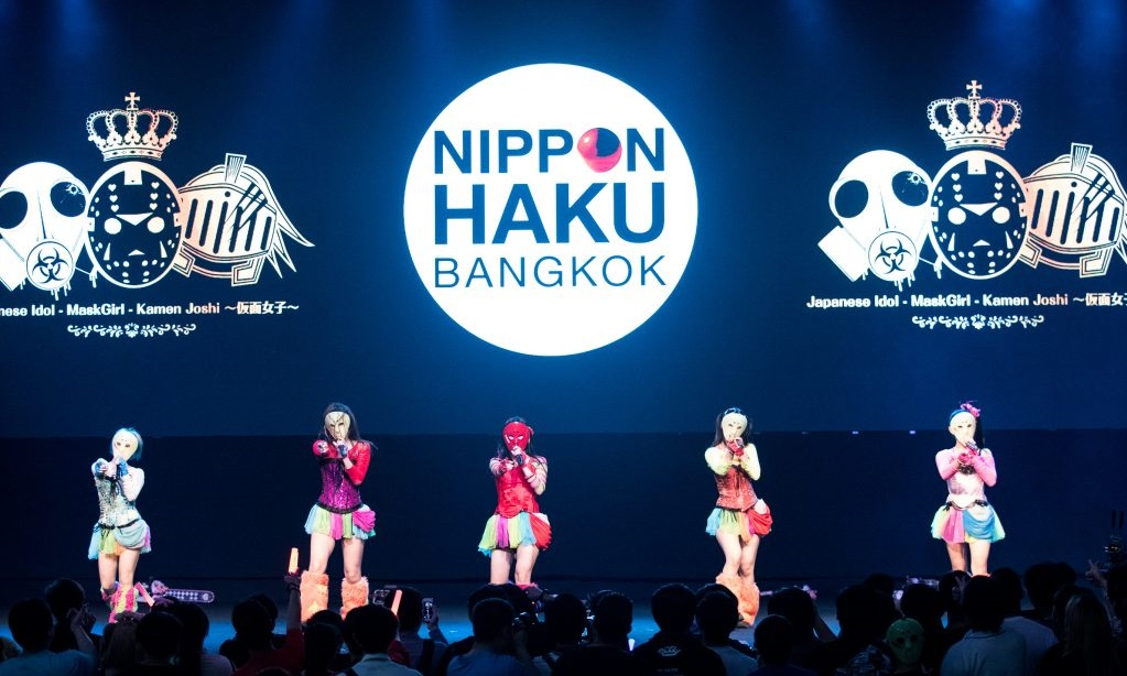 バンコク日本博2018 仮面女子ライブ